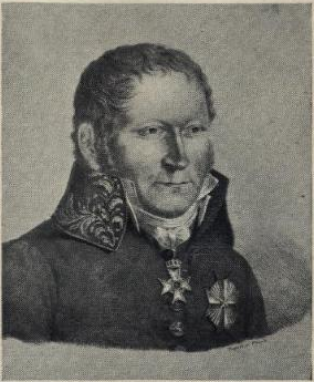 Norwegian: Statsråd Christian Krohg